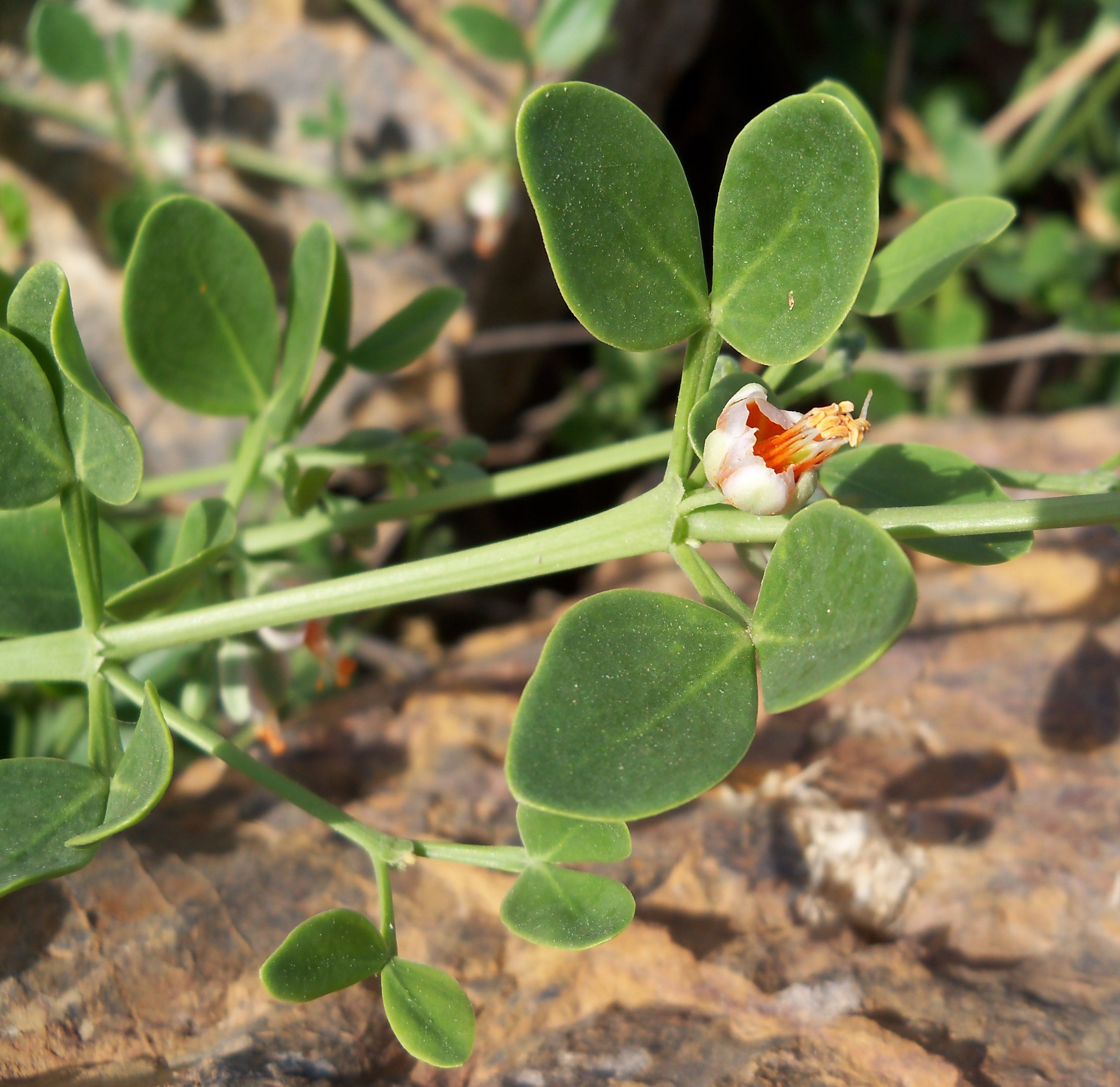 Zygophyllum fabago (Morsana) : Flor y hojas bifolioladas - Dique de la Rambla del Cañarete, Águilas (Murcia, España).